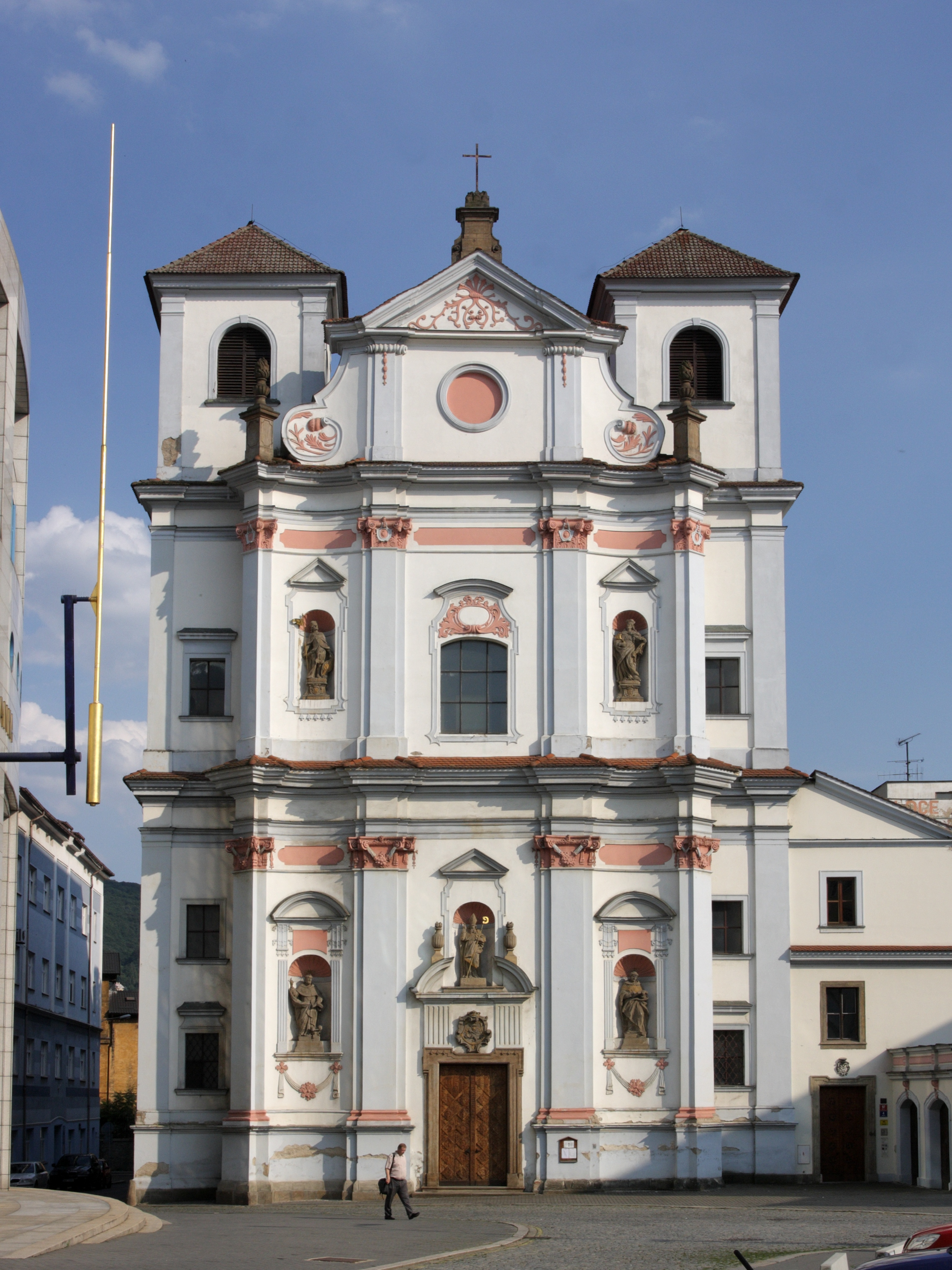 Ústí nad Labem - kostel svatého Vojtěcha, průčelí